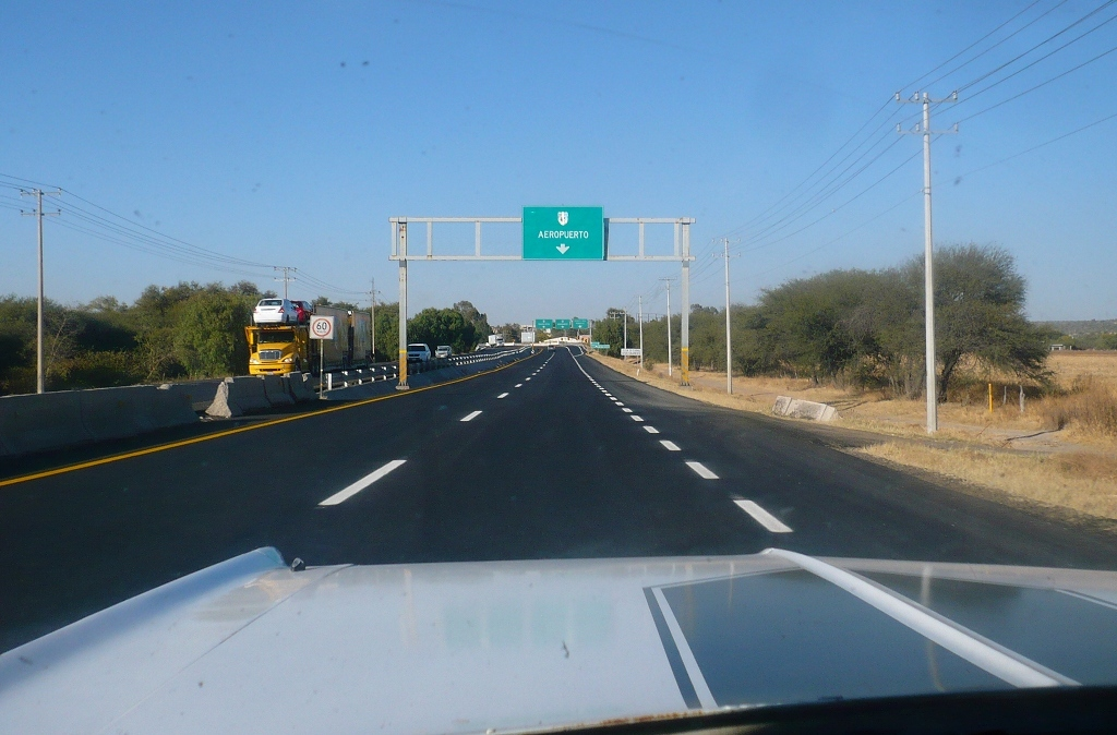 Vista de piloto de un Mónaco 1972 mostrando como las líneas de carrocería ayudan a una conducción adecuada.